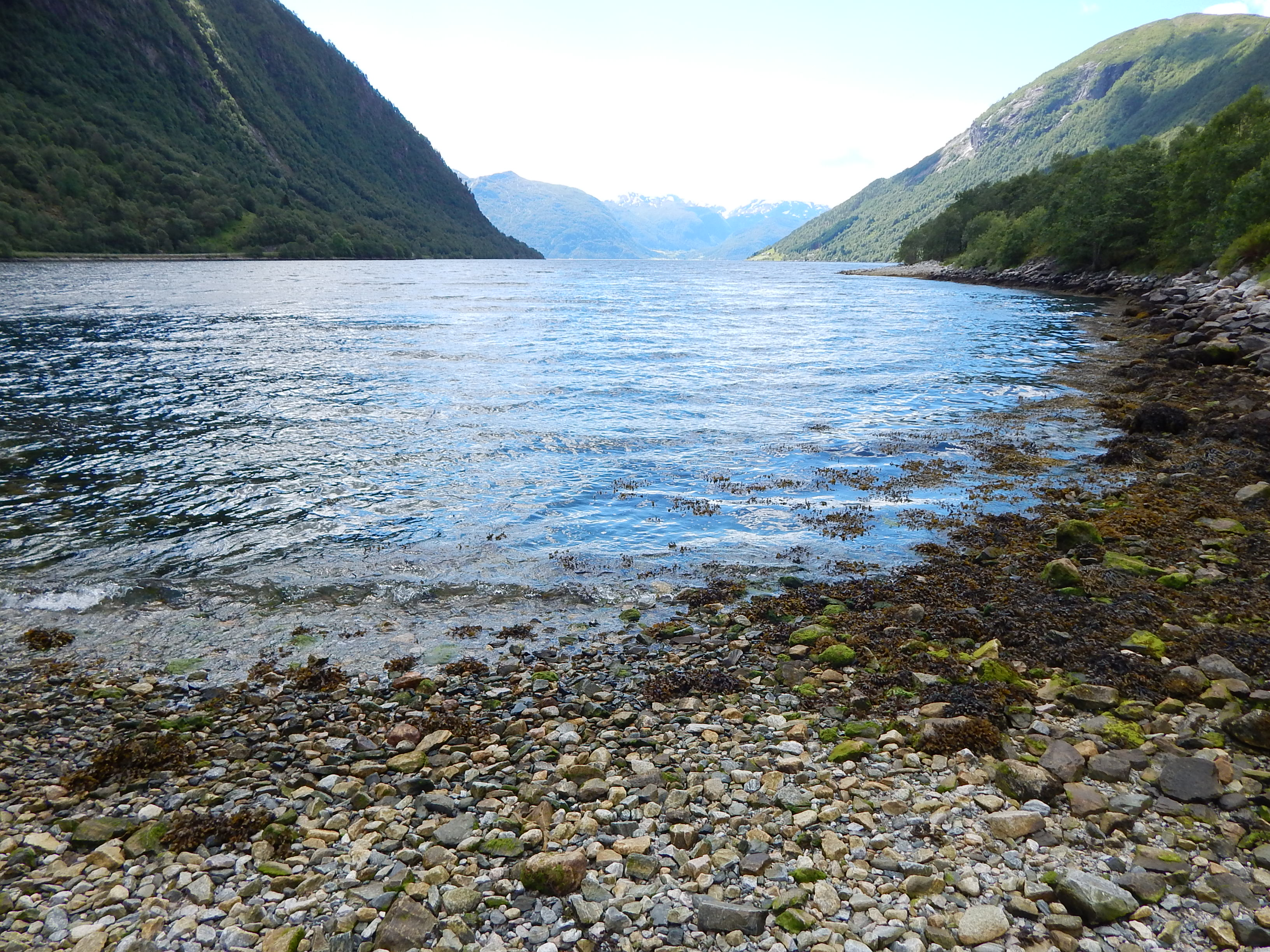 Lånefjorden